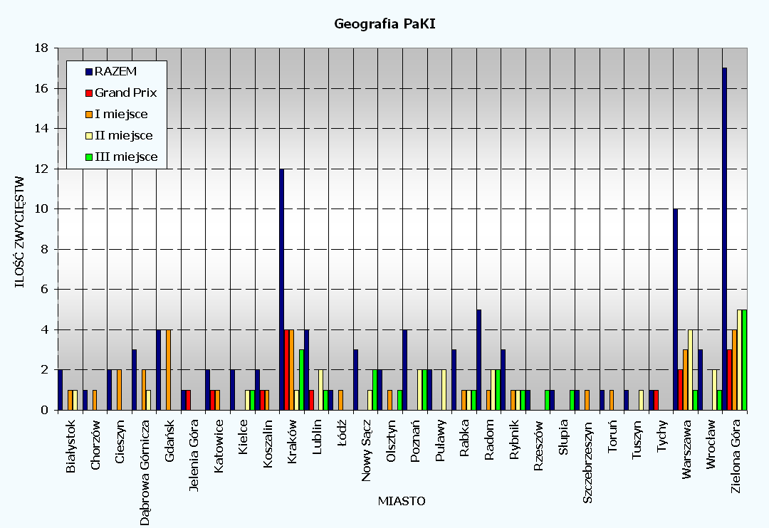 Statystyki PaKI (po 25 edycjach) - Udział poszczególnych miast, z których pochodzą nagrodzone kabarety, w poszczególnych szczeblach nagród.